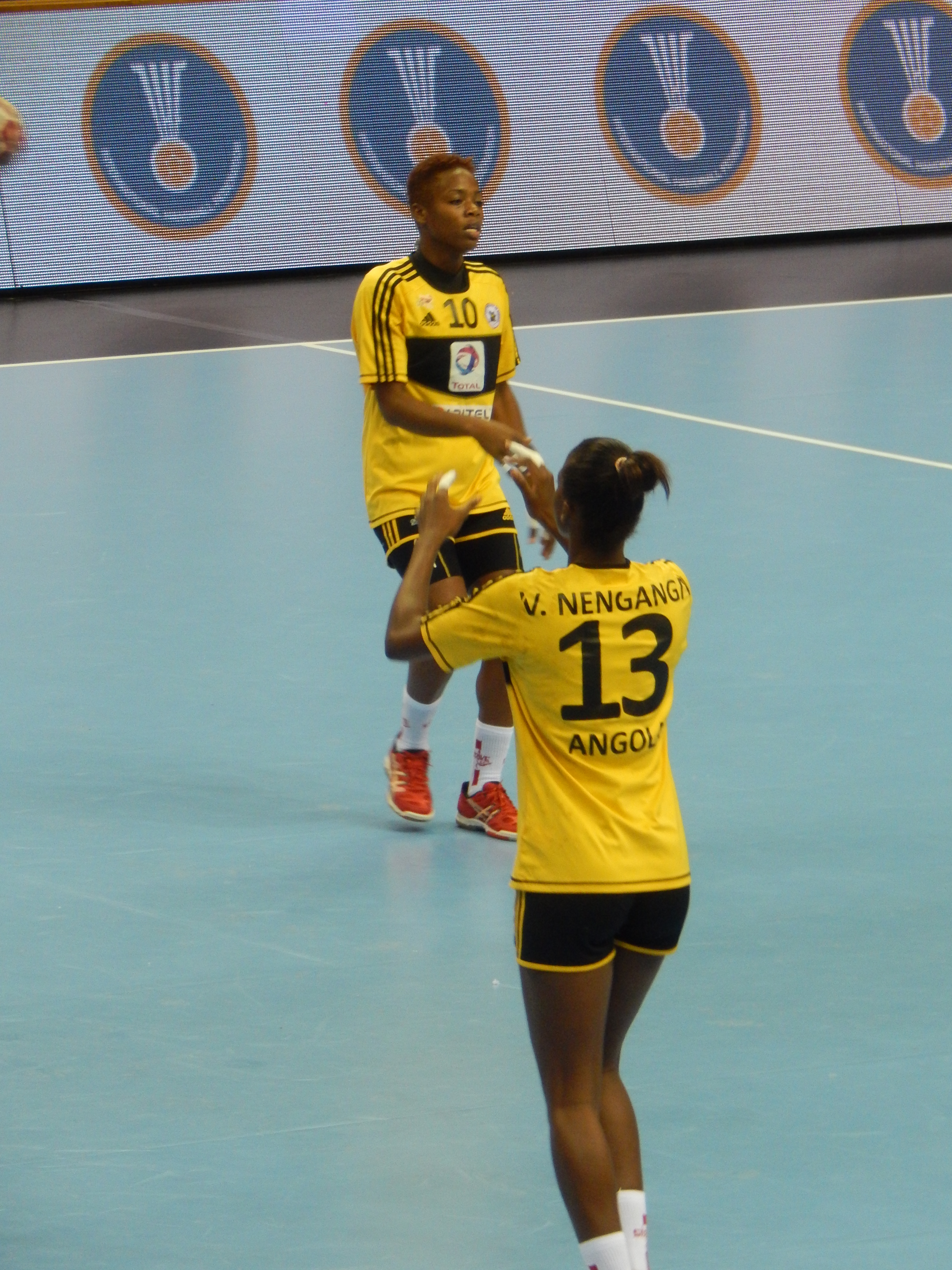 Чемпионат мира по гандболу среди девушек до 20 лет. Групповой этап, группа A. Матч Узбекистан - Ангола